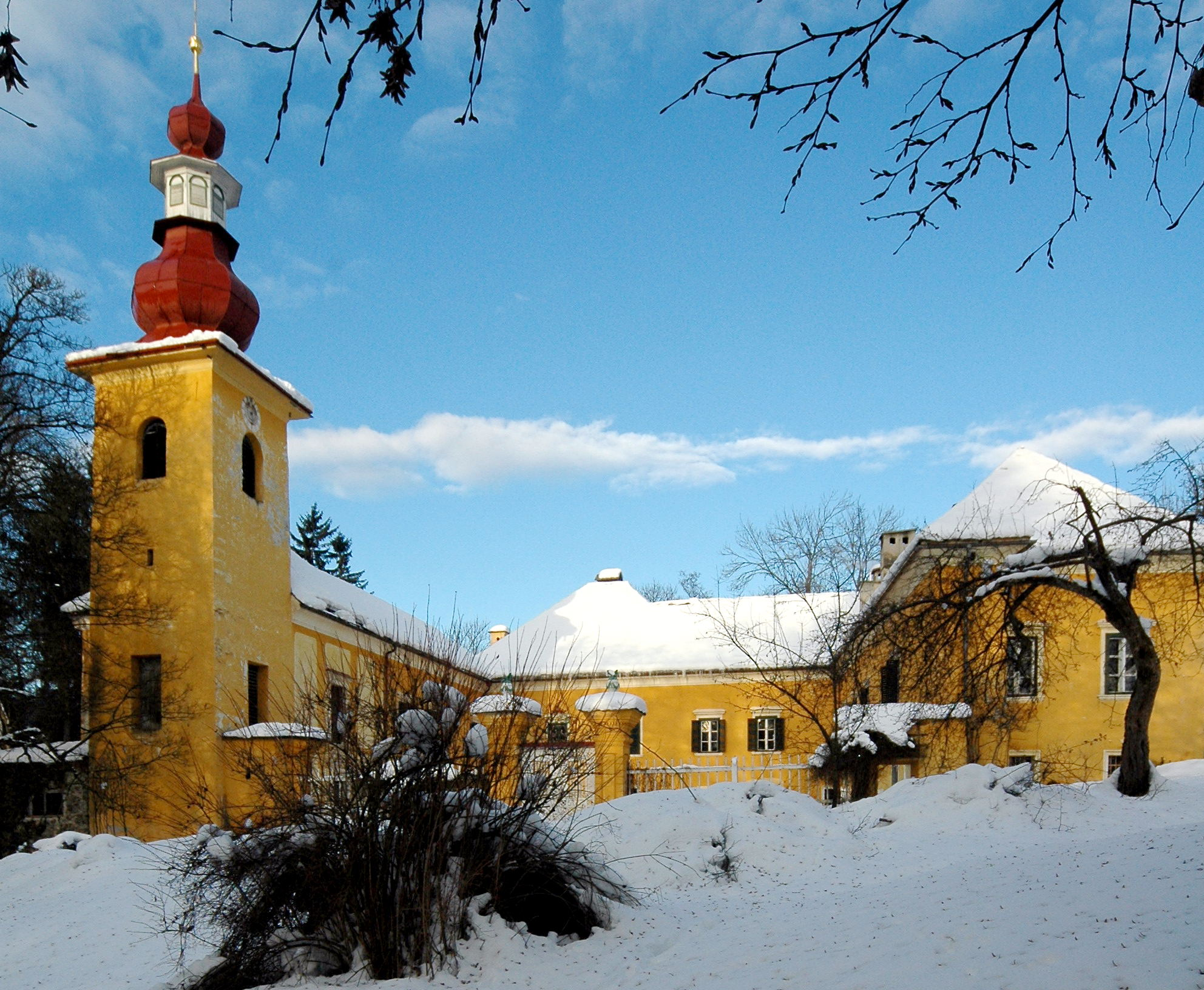 Castle Damtschach, Wernberg, Carinthia, Austria